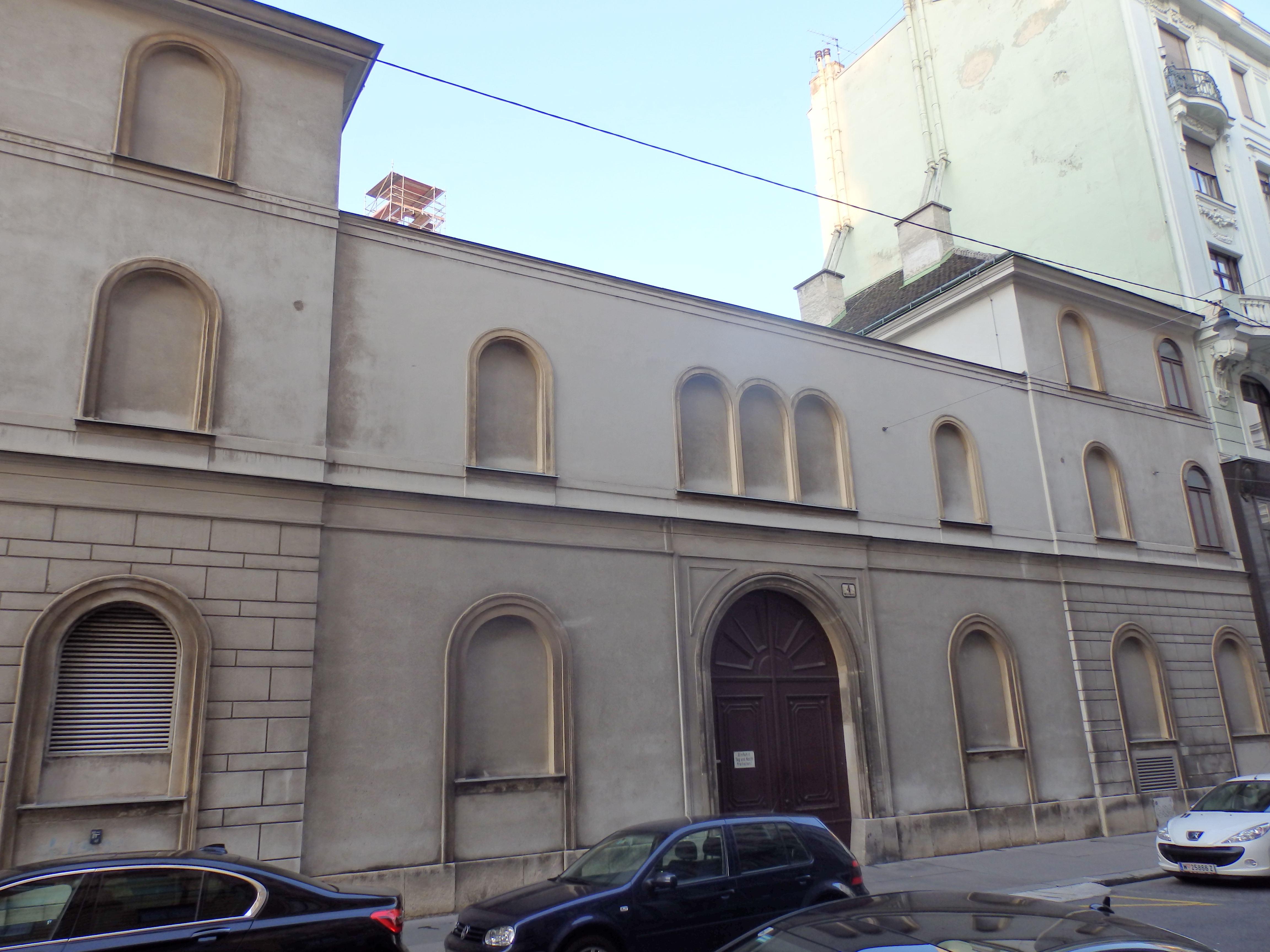 Kapuzinerkloster (1840-42) von Johann Höhne, Gluckgasse 4, Wien-Innere Stadt